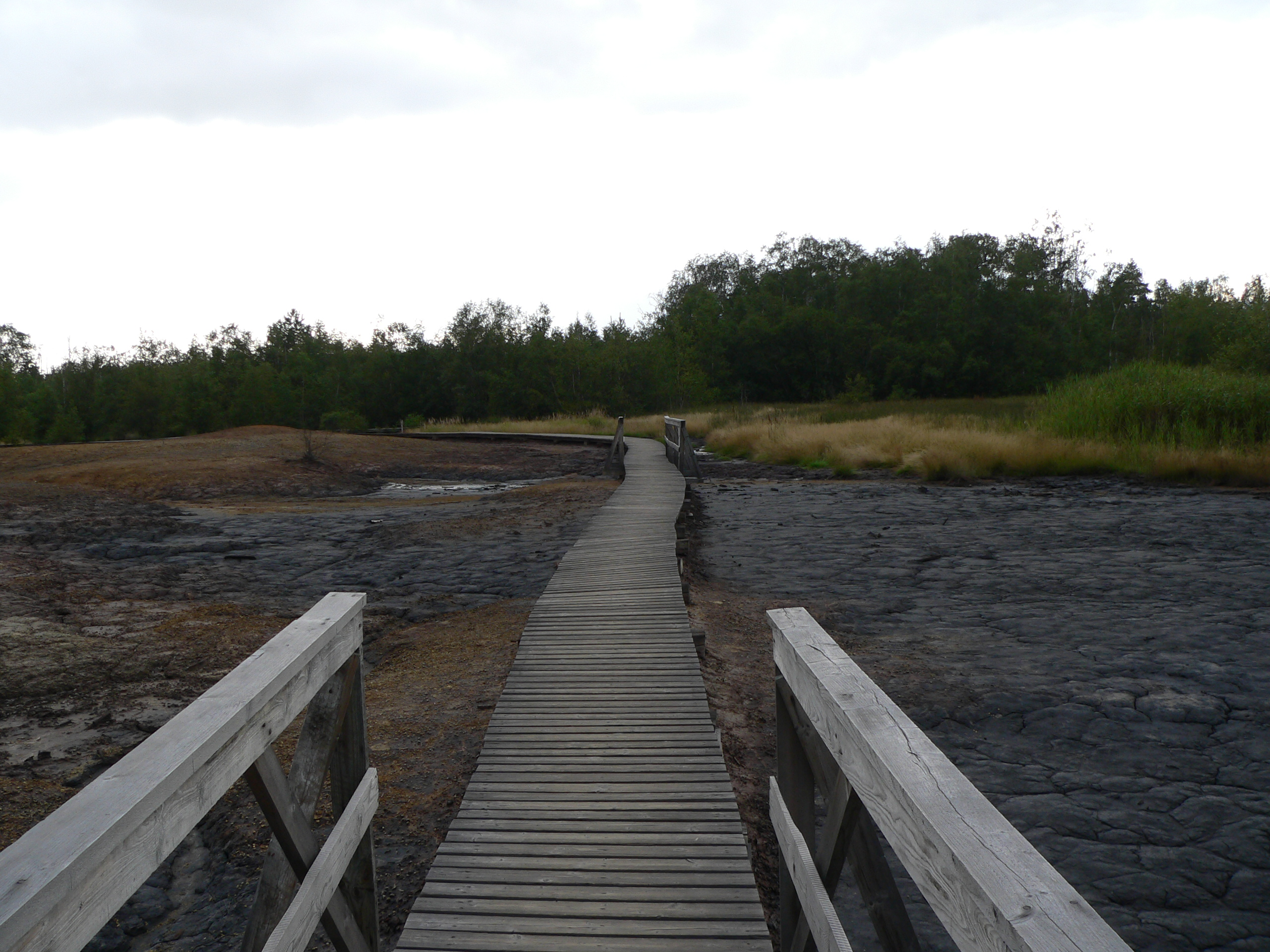 Der Bohlensteg durch das Soos, Naturreservat Soos, Tschechische Republik.